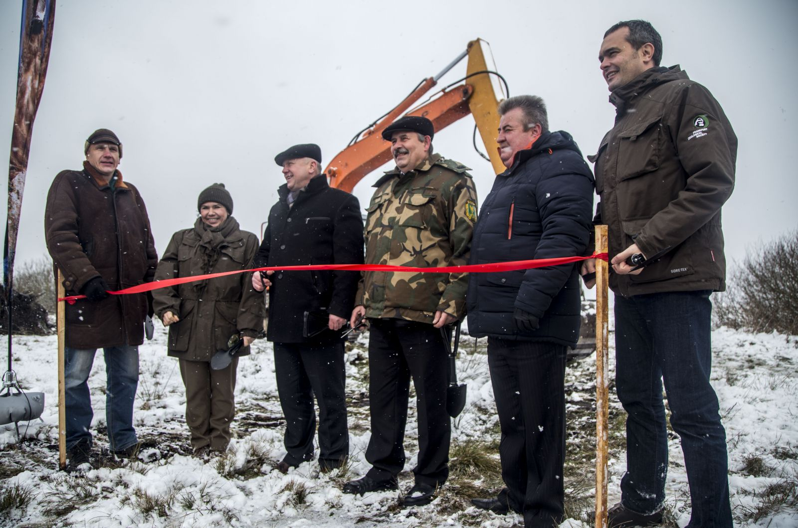 Урачысты пачатак працы па паўторным забалочванні балота Дзікі Нікар.